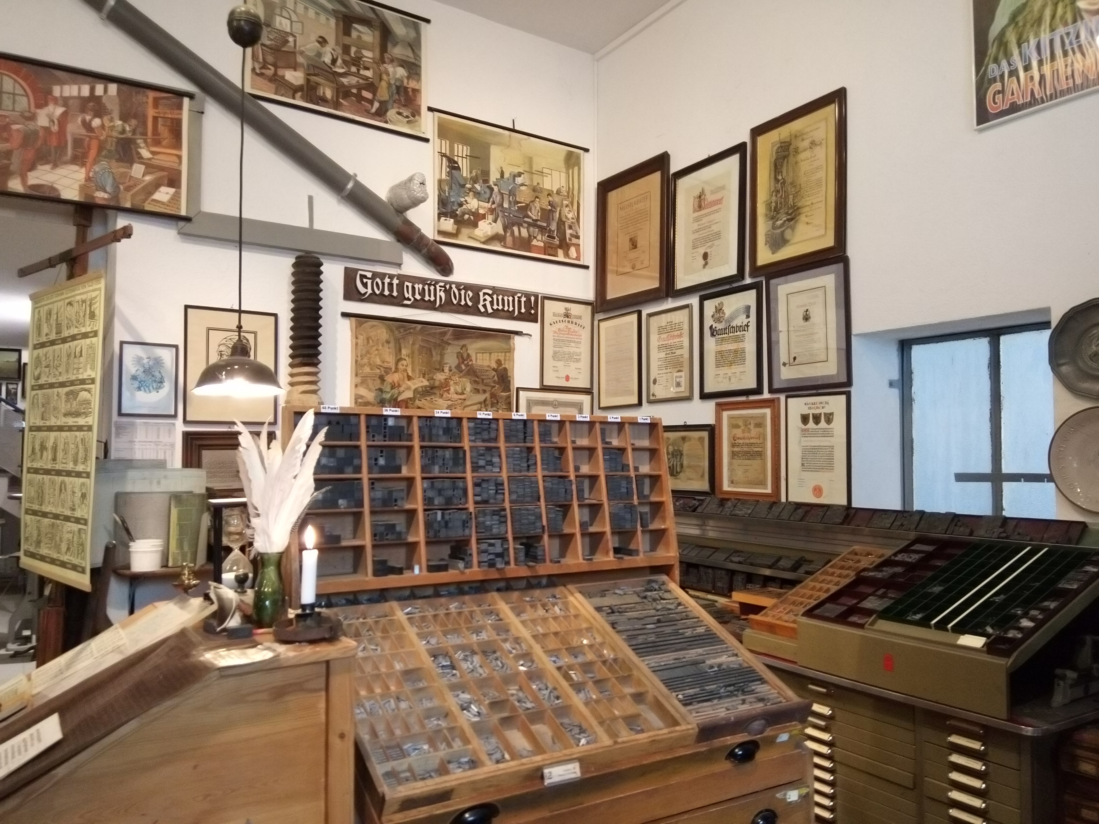 Setzkästen der privaten Sammlung Officina Historica in Kitzingen